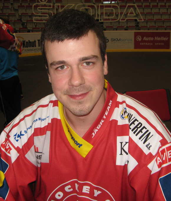 Po zakončení sezóny 2014/15 ve Werk Areně